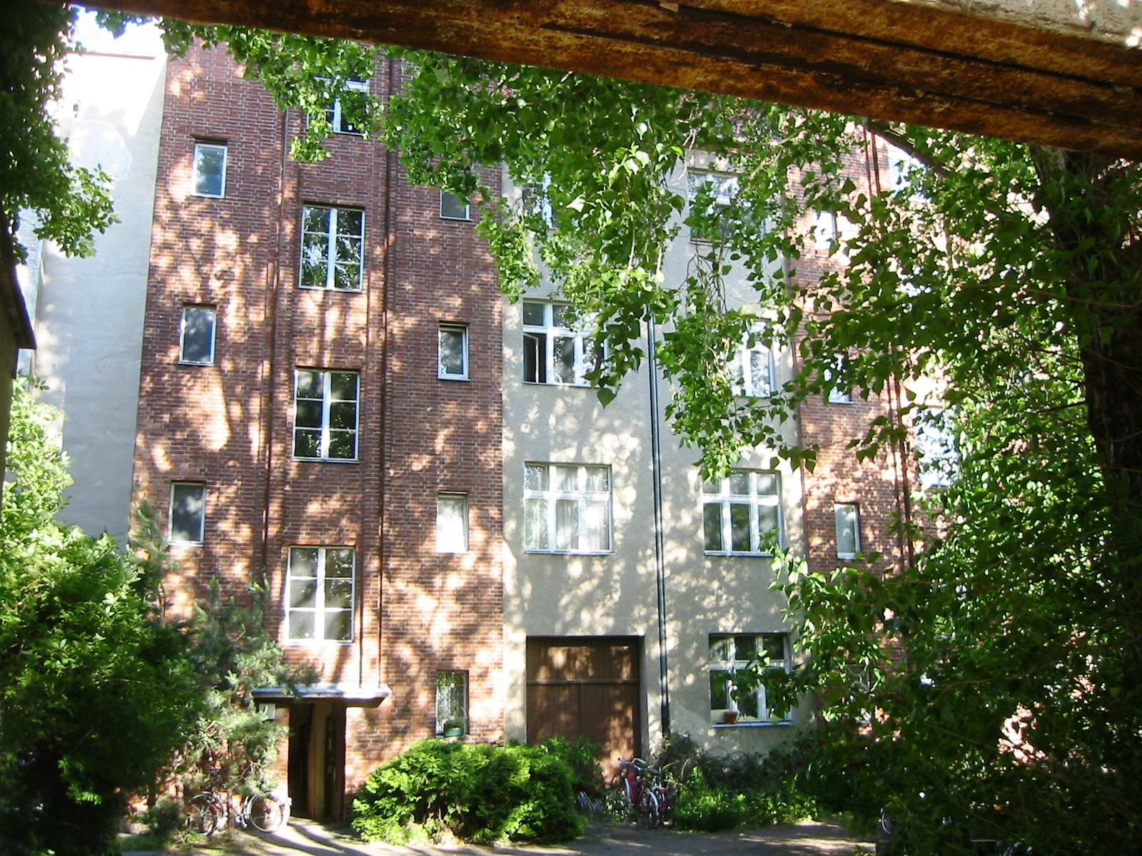 Denkmalgeschützte Häuser in der Enckestraße 4 und 4a in Berlin-Kreuzberg